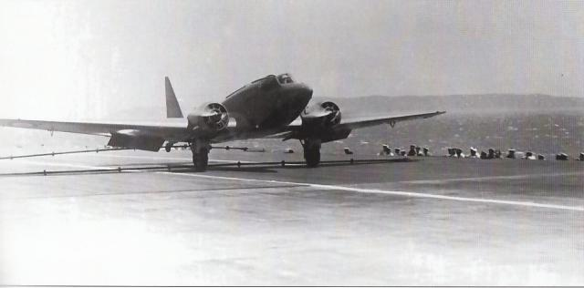 Appontage d'un Potez 56E